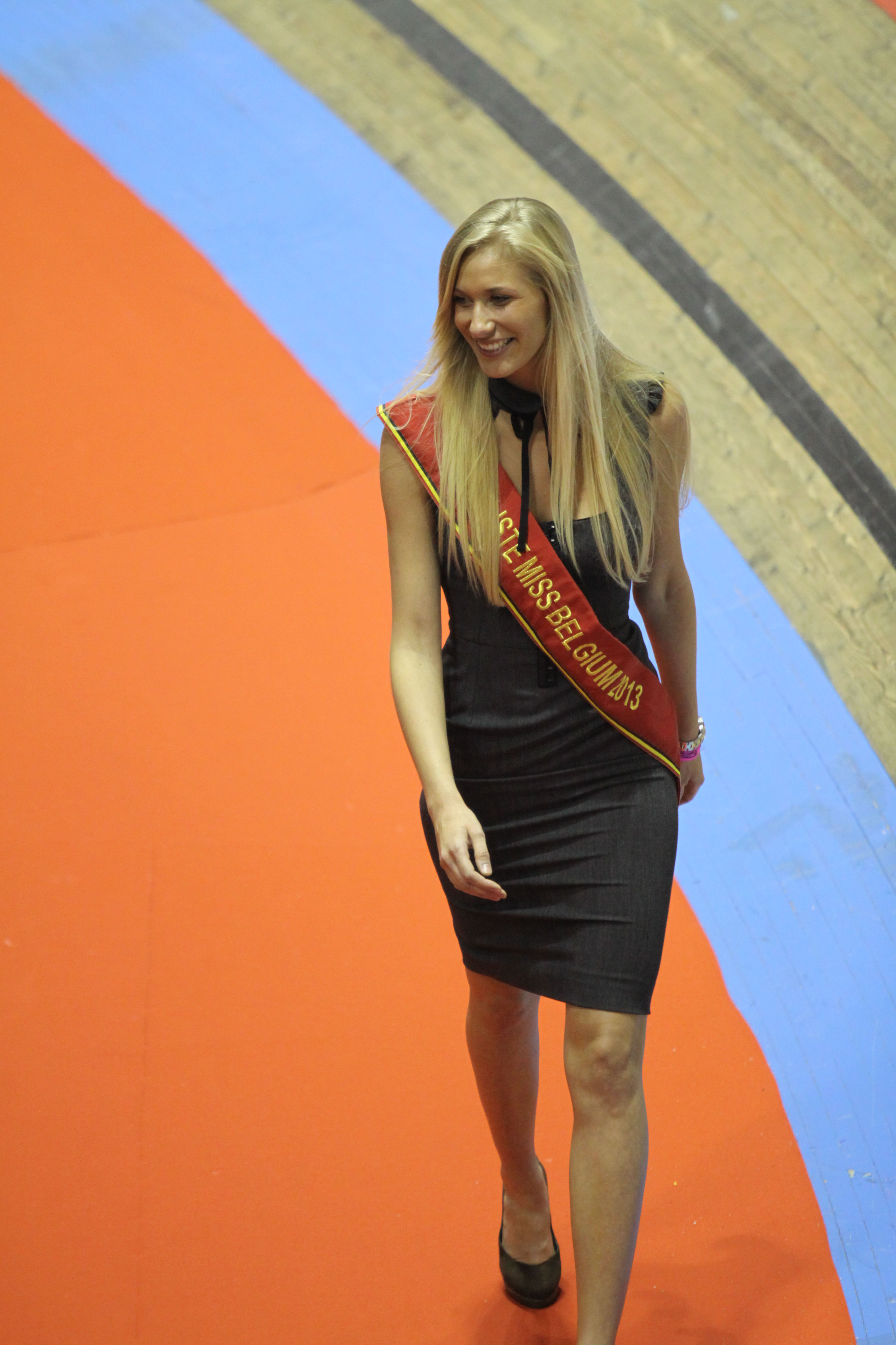 Noémie Happart - Lotto Zesdaagse Vlaanderen-Gent 2012